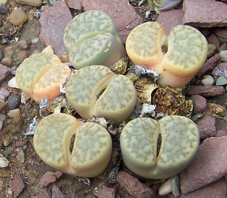 Lithops bromfieldii var. mennellii, St. Gallen strain